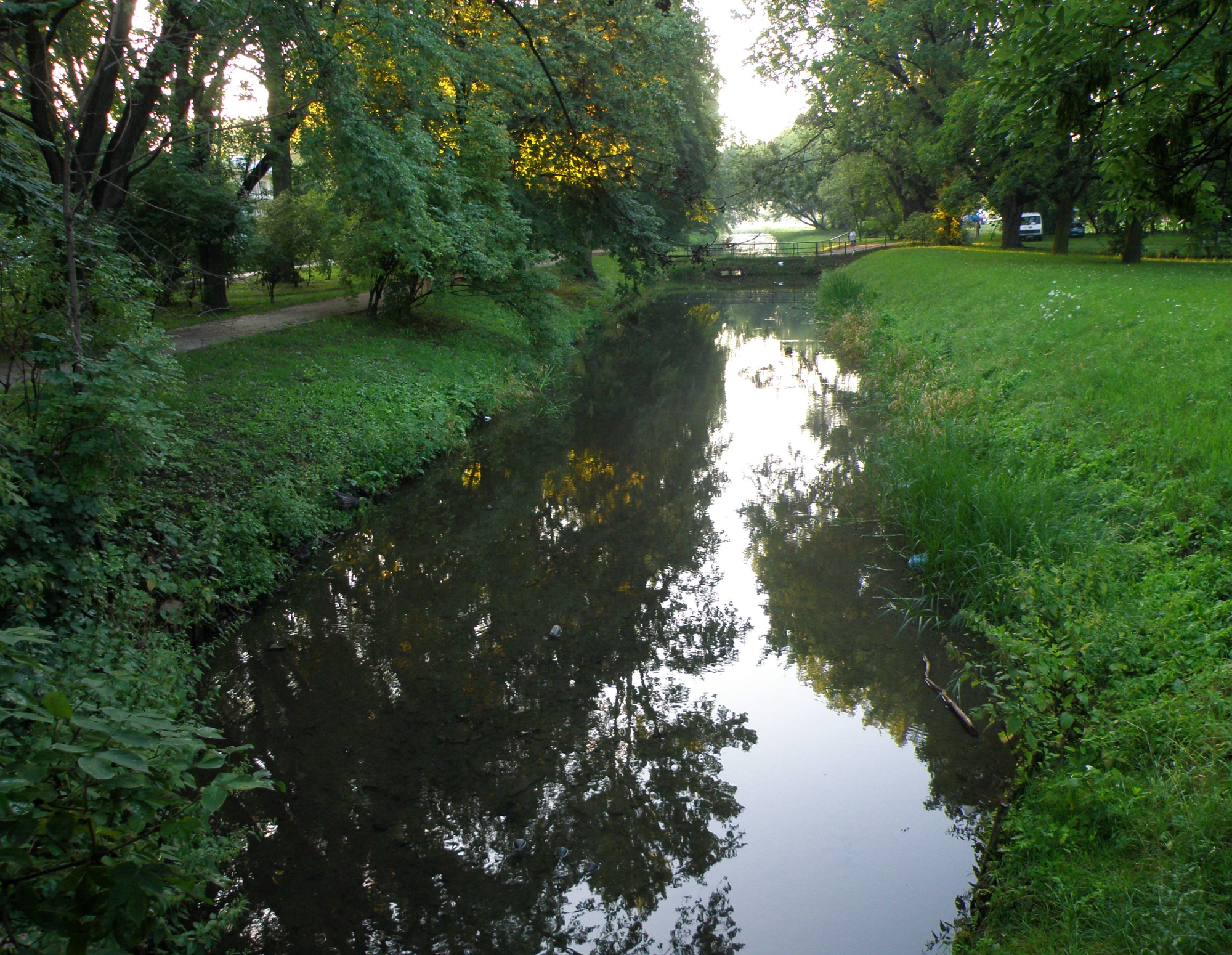 Warszawa, Park Skaryszewski